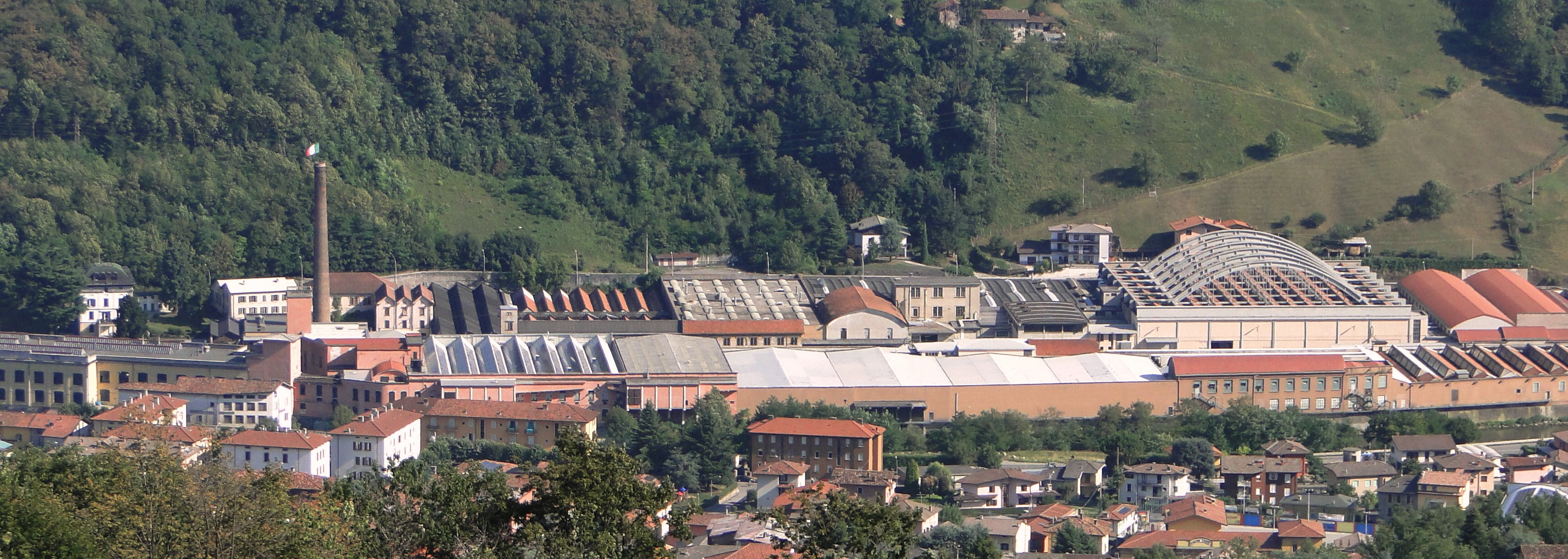 Complesso industriale Bellora. Cene (BG), Italia